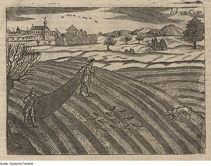 Original image description from the Deutsche Fotothek Jagdwesen & Jagd & Vogel & Netz